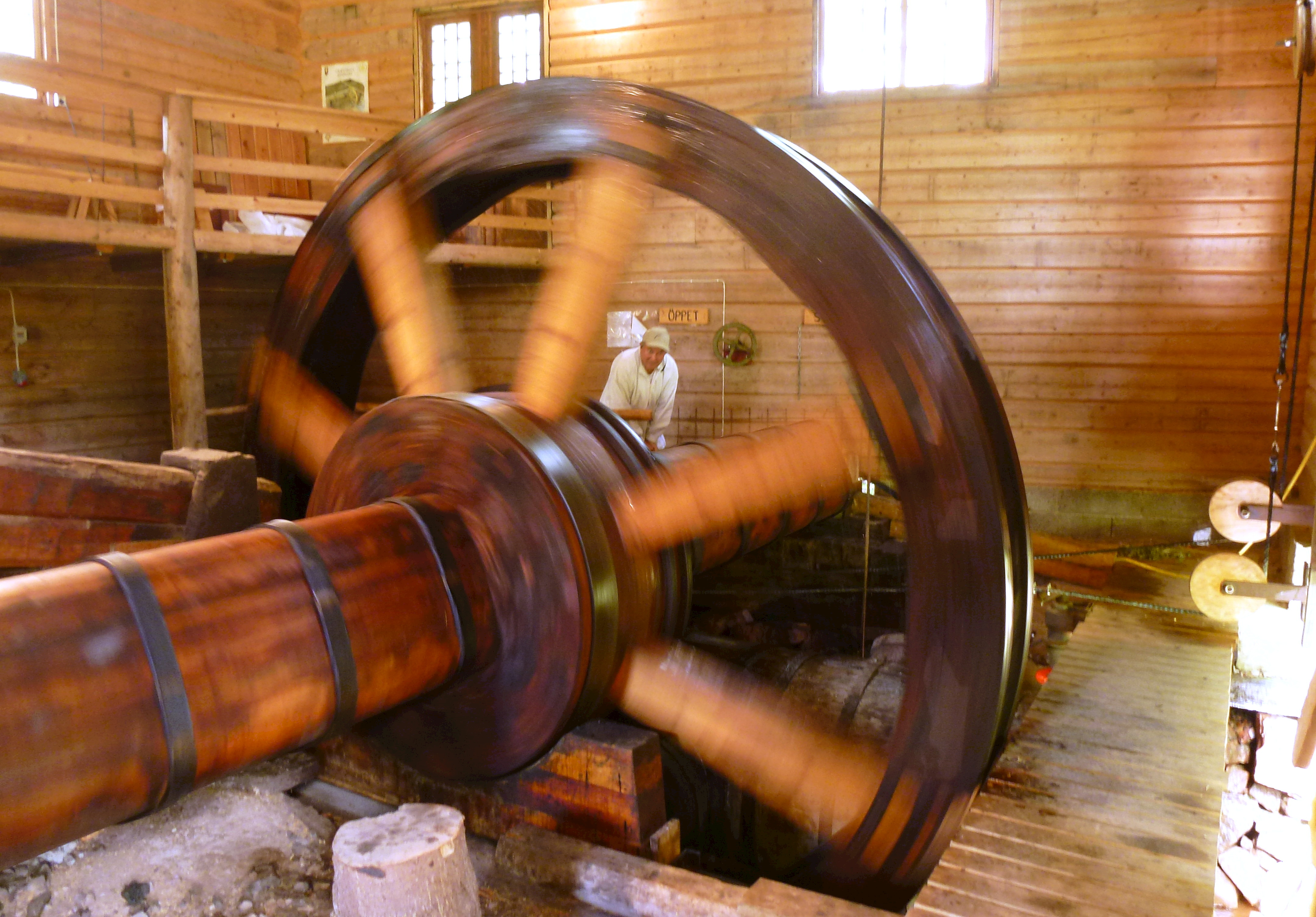 Gravendals räckhammare